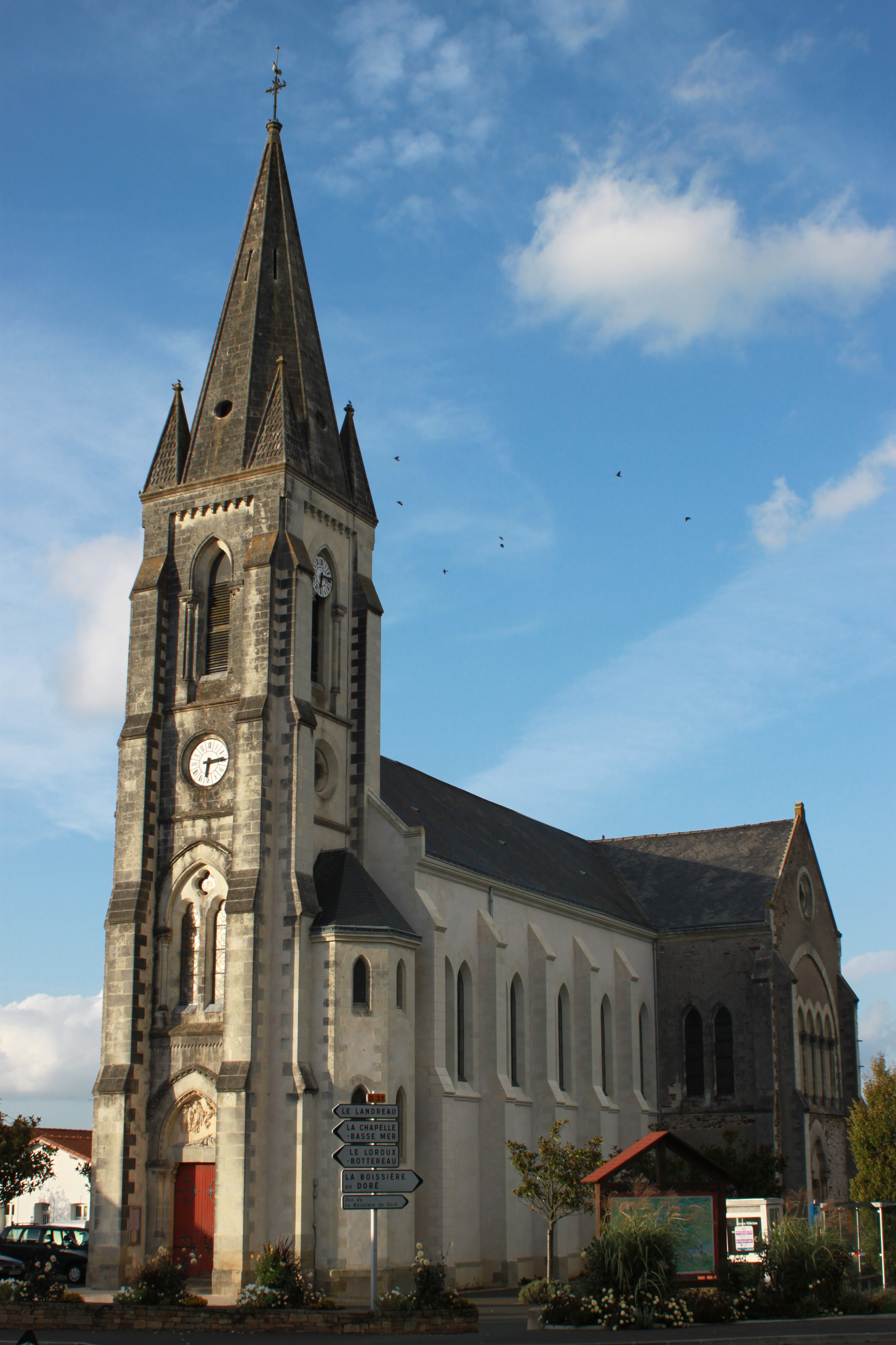 Église Saint-Martin, 1869, La Remaudière.